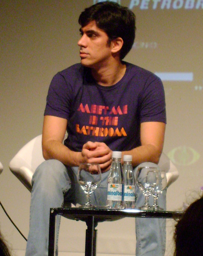 Marcelo Adnet no Festival Internacional de Televisão em 2008.